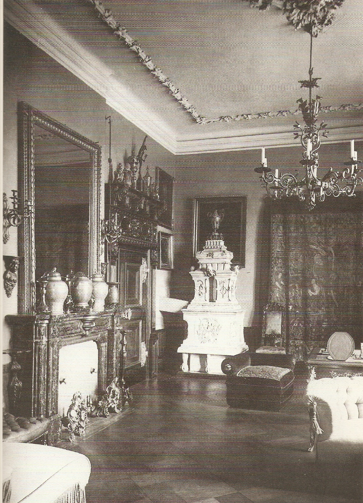 Salon w pałacu Radolińskich w Jarocinie, rok 1908.